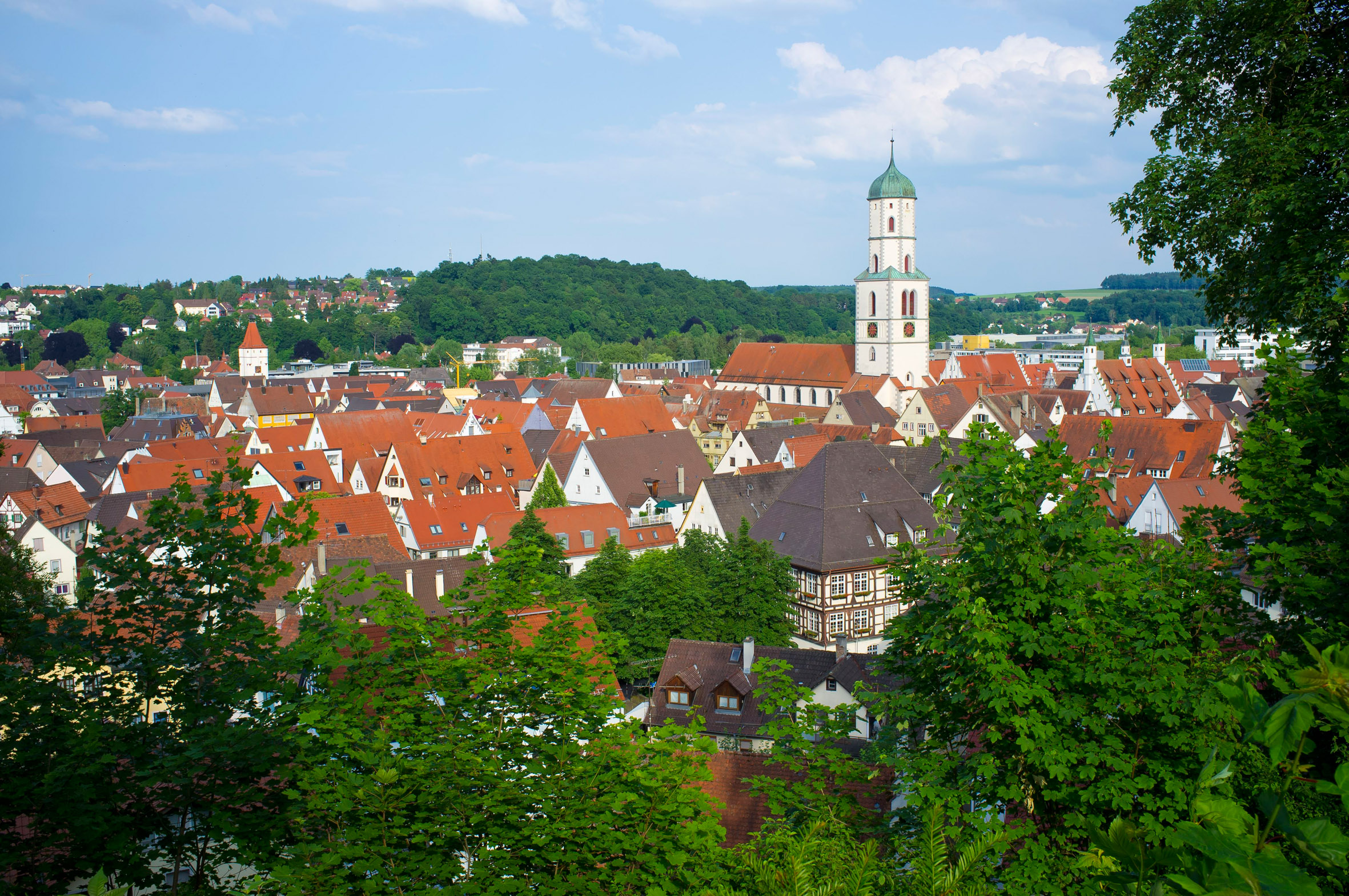 Sicht auf die Innenstadt von Biberach